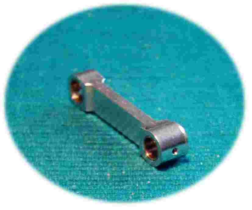 Pleuel eines Modellflugmotors 6,9 ccm